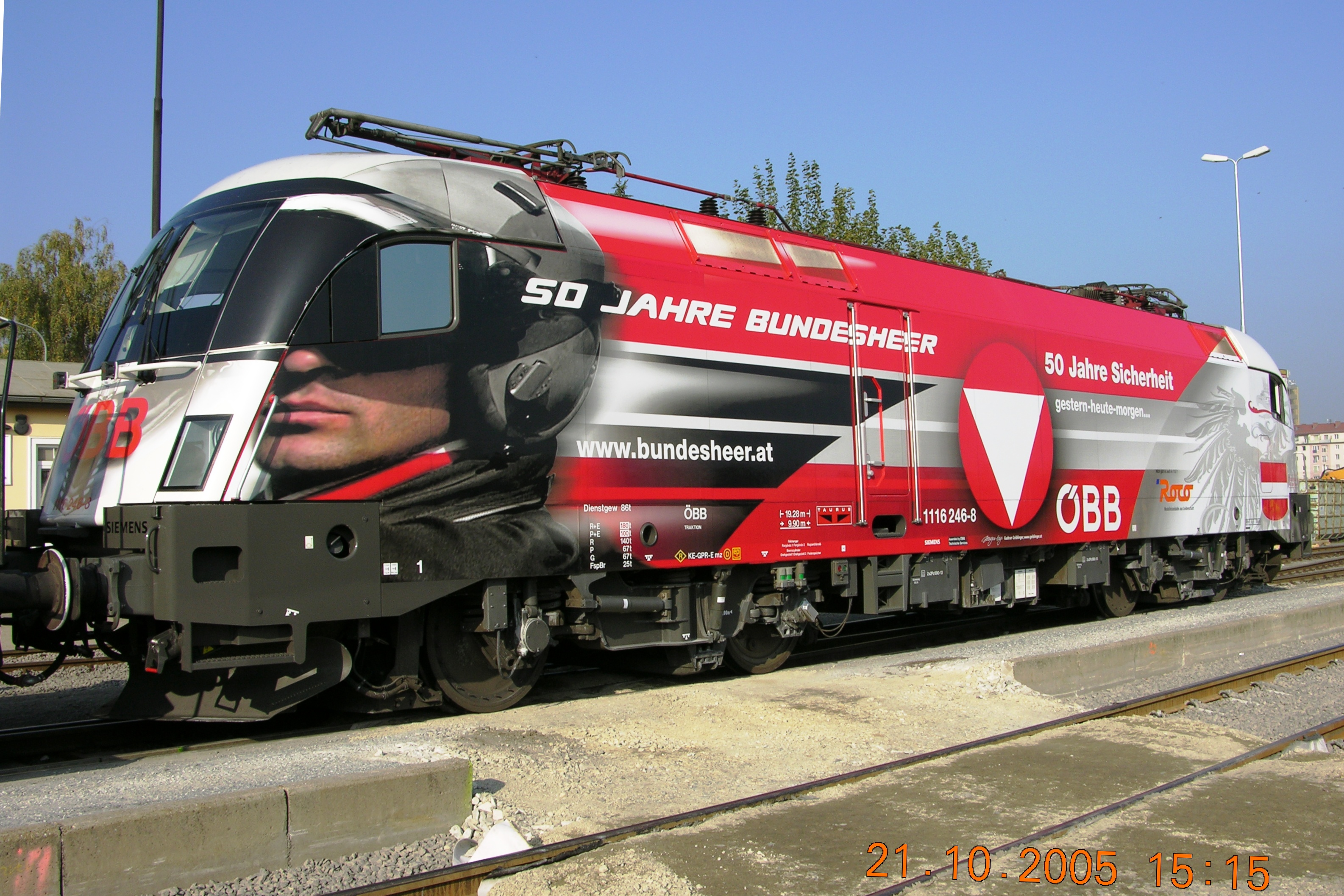 Taurus Lok im 50-Jahre-Bundesheer Design am Graz Köflacherbahnhof